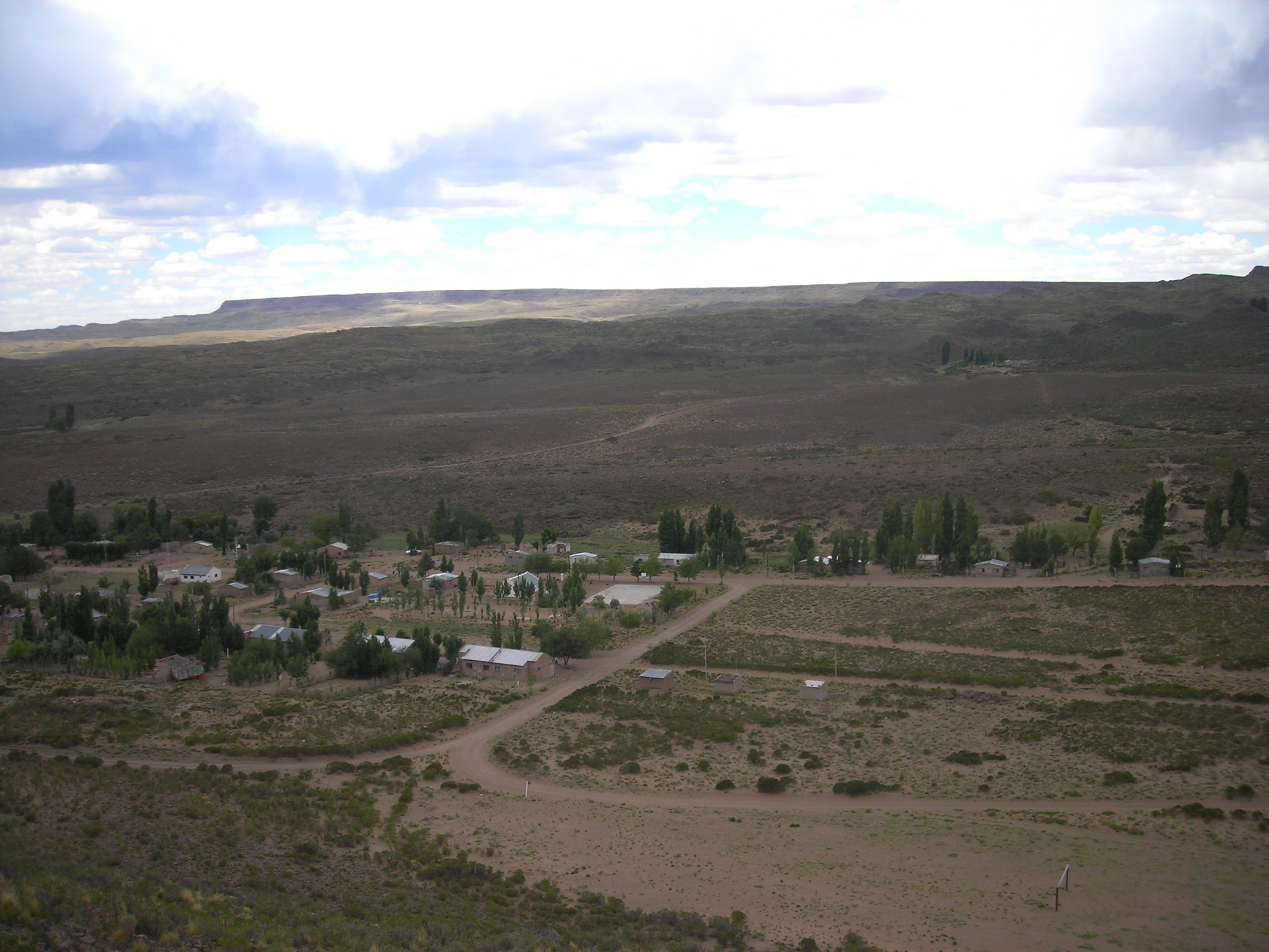 foto de Prahuaniyeo